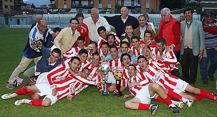 Il S.S. Rende con la Coppa Italia Regionale di Prima Categoria